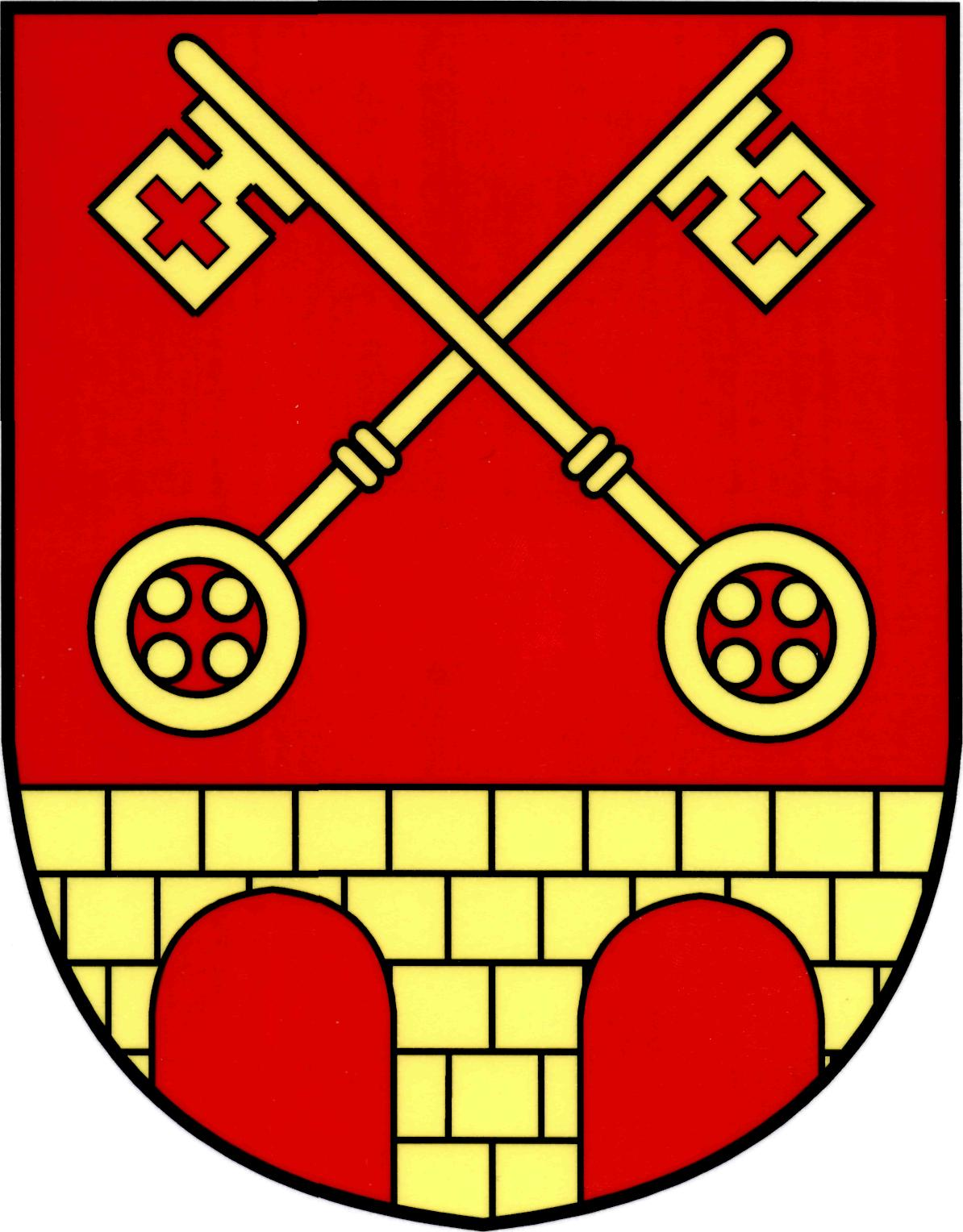 Znak obce Kamenný Most (okres Kladno)